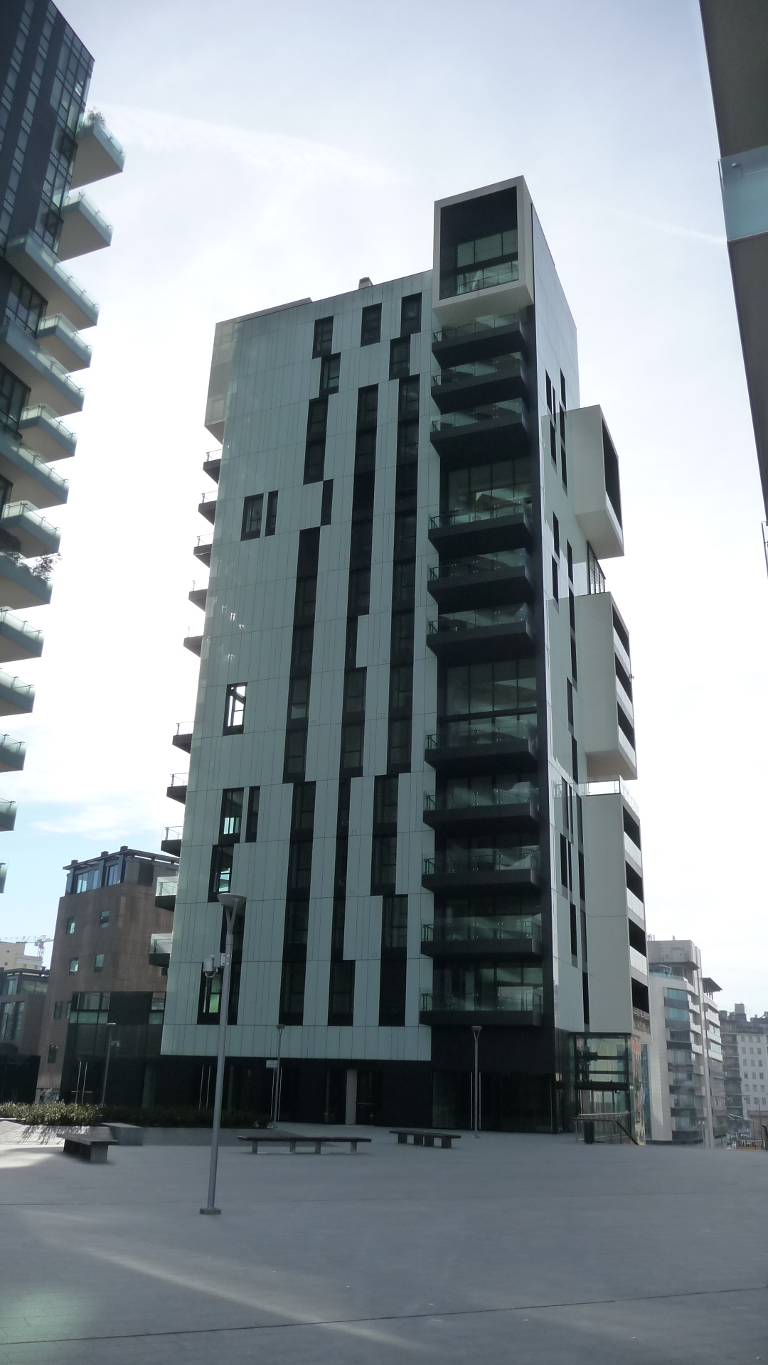 Vista della Torre Solea dalla piazza sottostante